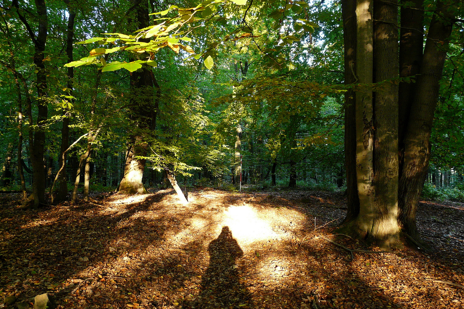 Vrchol Rokytské horky